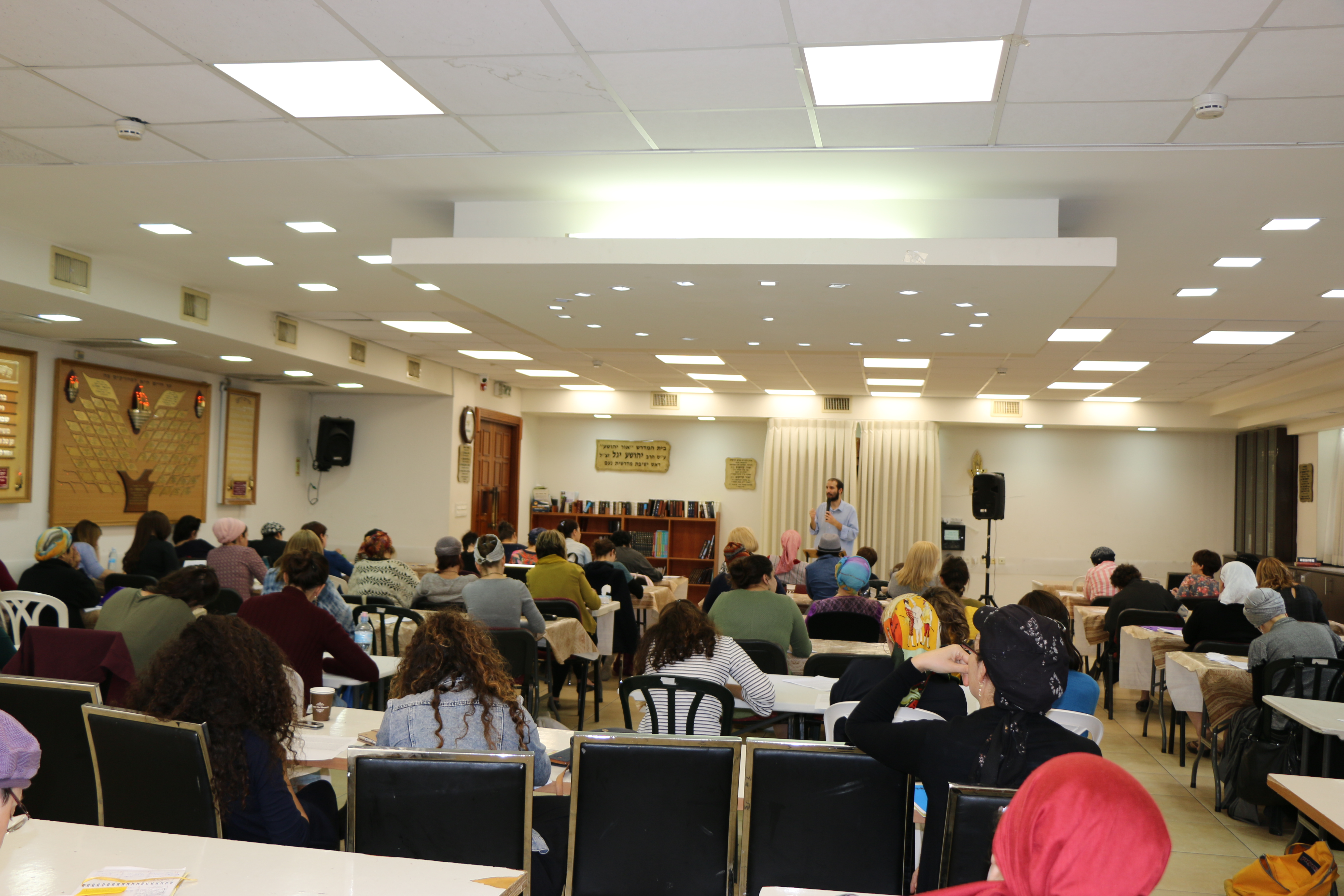 מדרשת אוריה